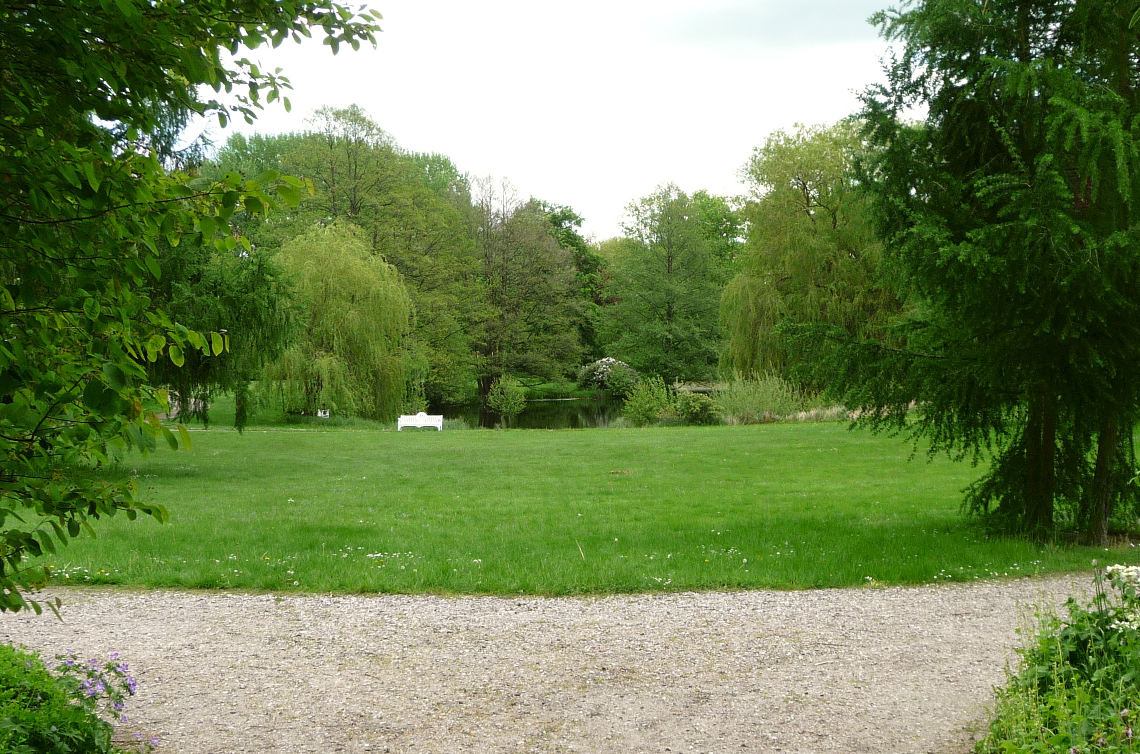 Schloss Tremsbüttel, Parkanlage